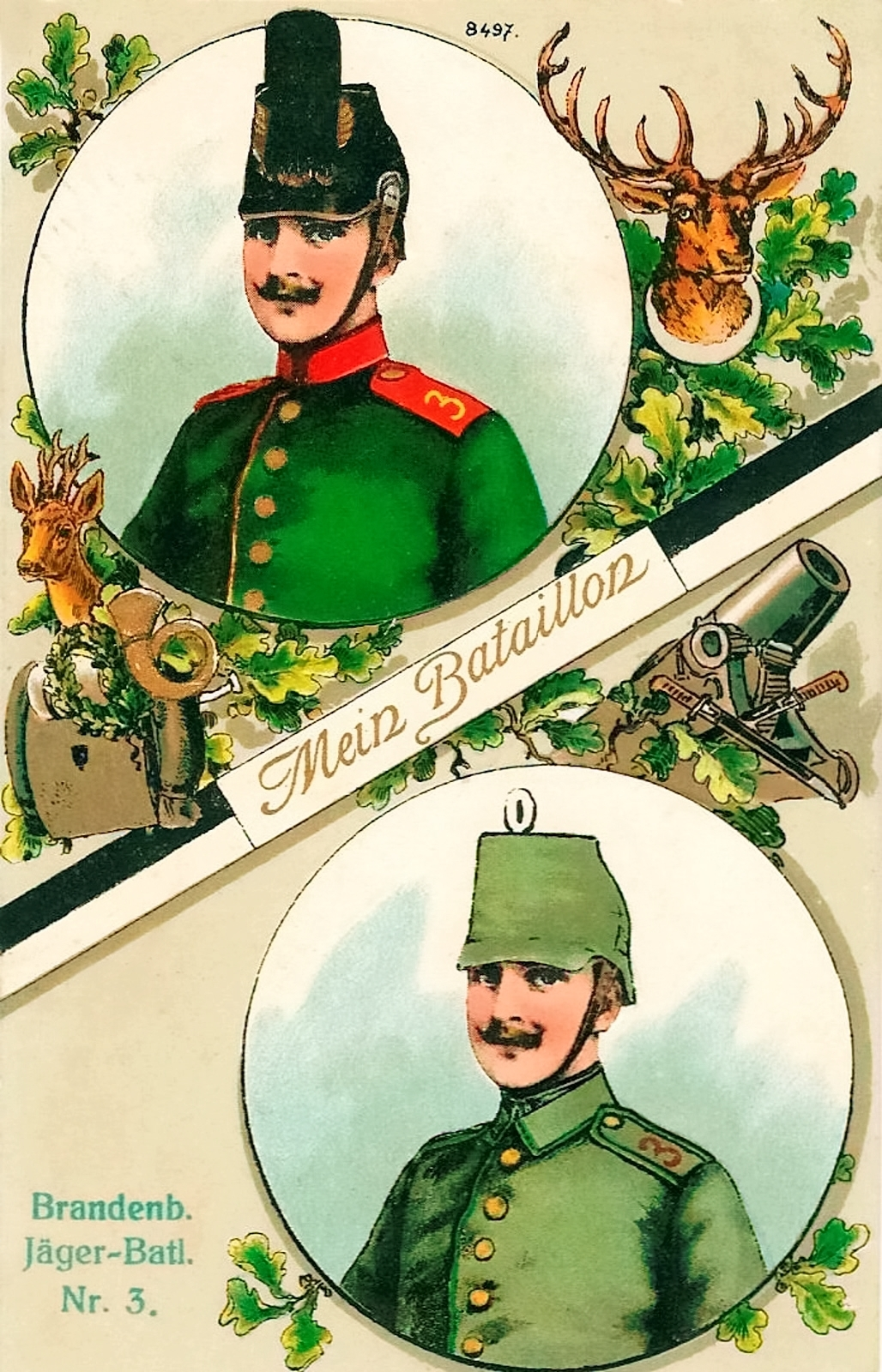 Feldpostkarte des „Brandenburgischen Jäger-Bataillons Nr. 3“.